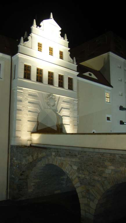 Schlosstor des Schlosses Freudenstein Freiberg/Sachsen